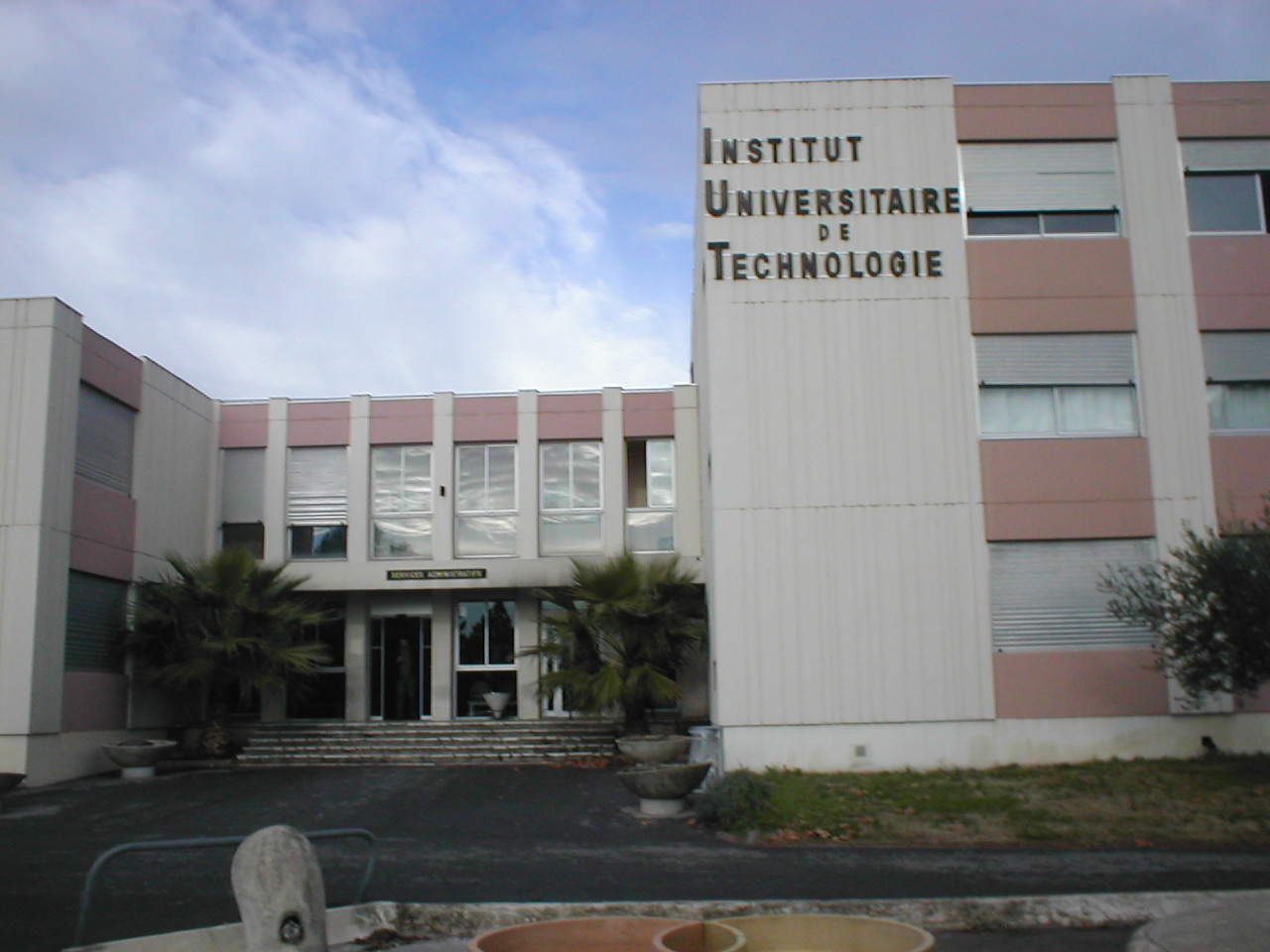 Le bâtiment de l'IUT de Nîmes Image perso